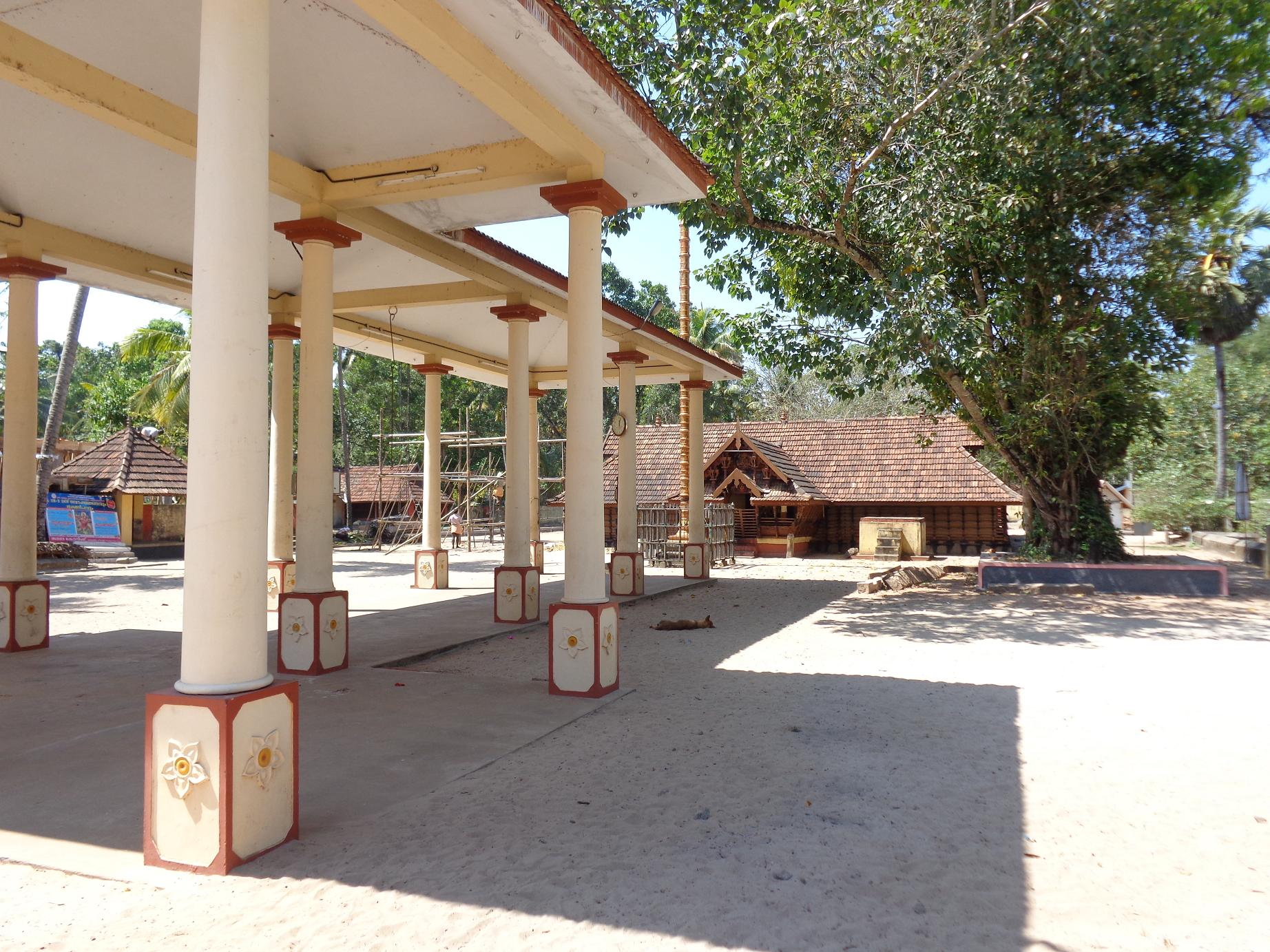 karazhma devi temple, chennithala, mavelikara